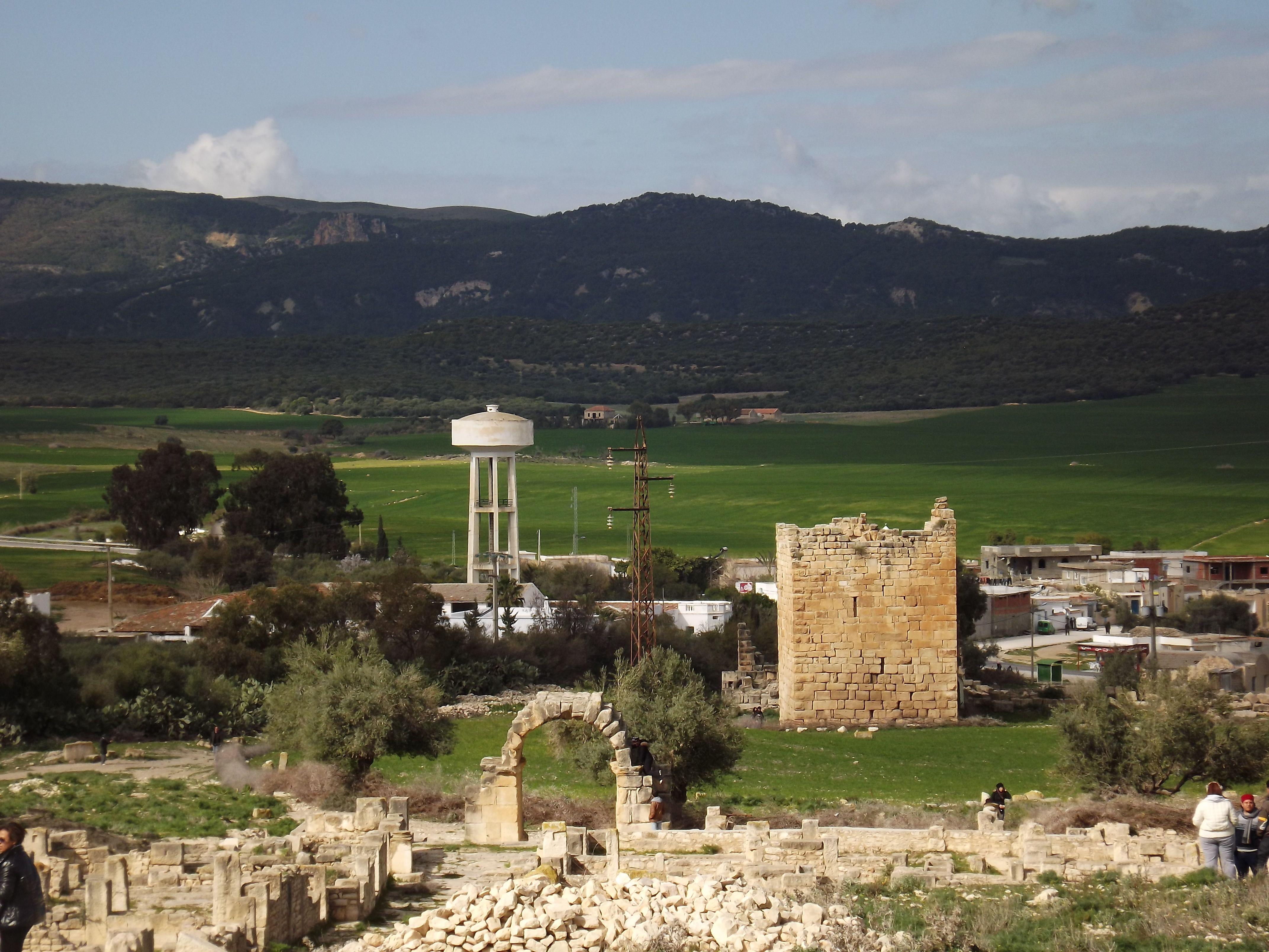 Le site archéologique de ain tounga